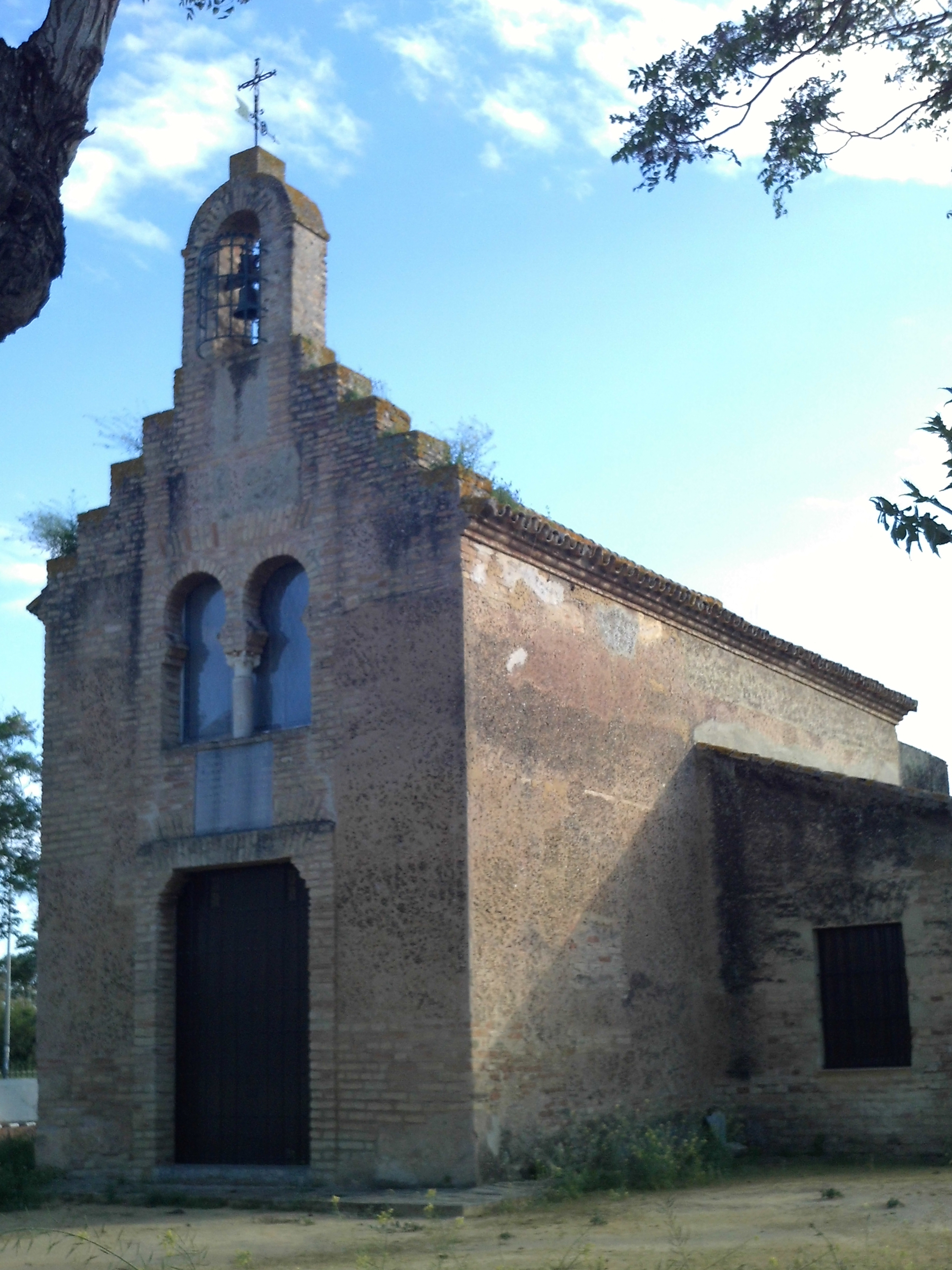 Ermita de Nuestra Señora de Valme. Sevilla, Andalucía, España.